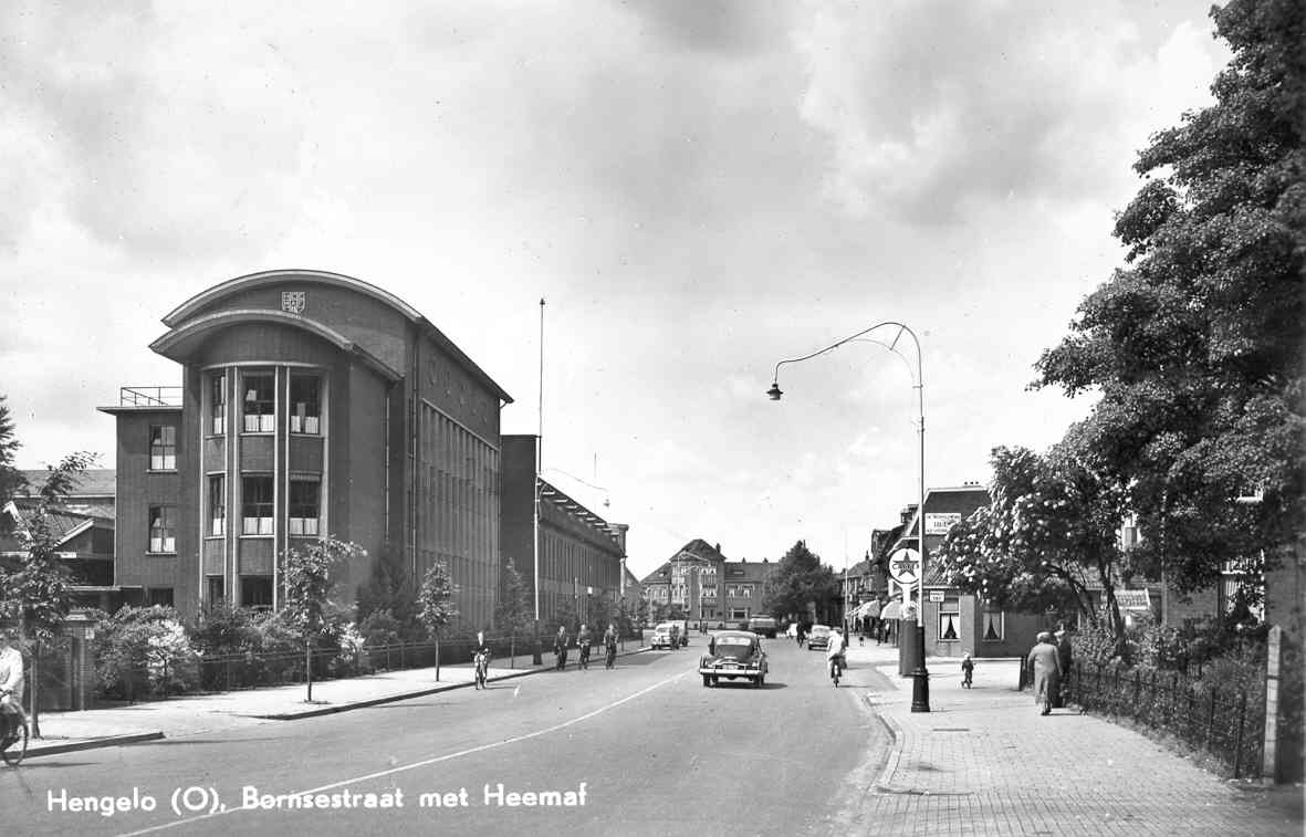 "Bornsestraat met Heemaf"; view of Bornsestraat in Hengelo (Overijssel), showing the (now defunct) Heemaf factory.